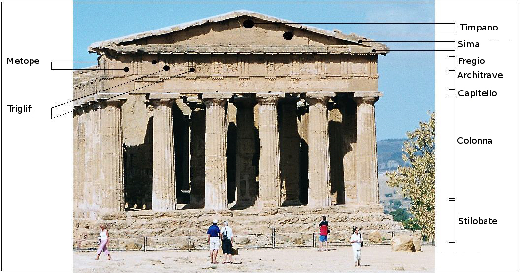 Parti del Tempio Dorico